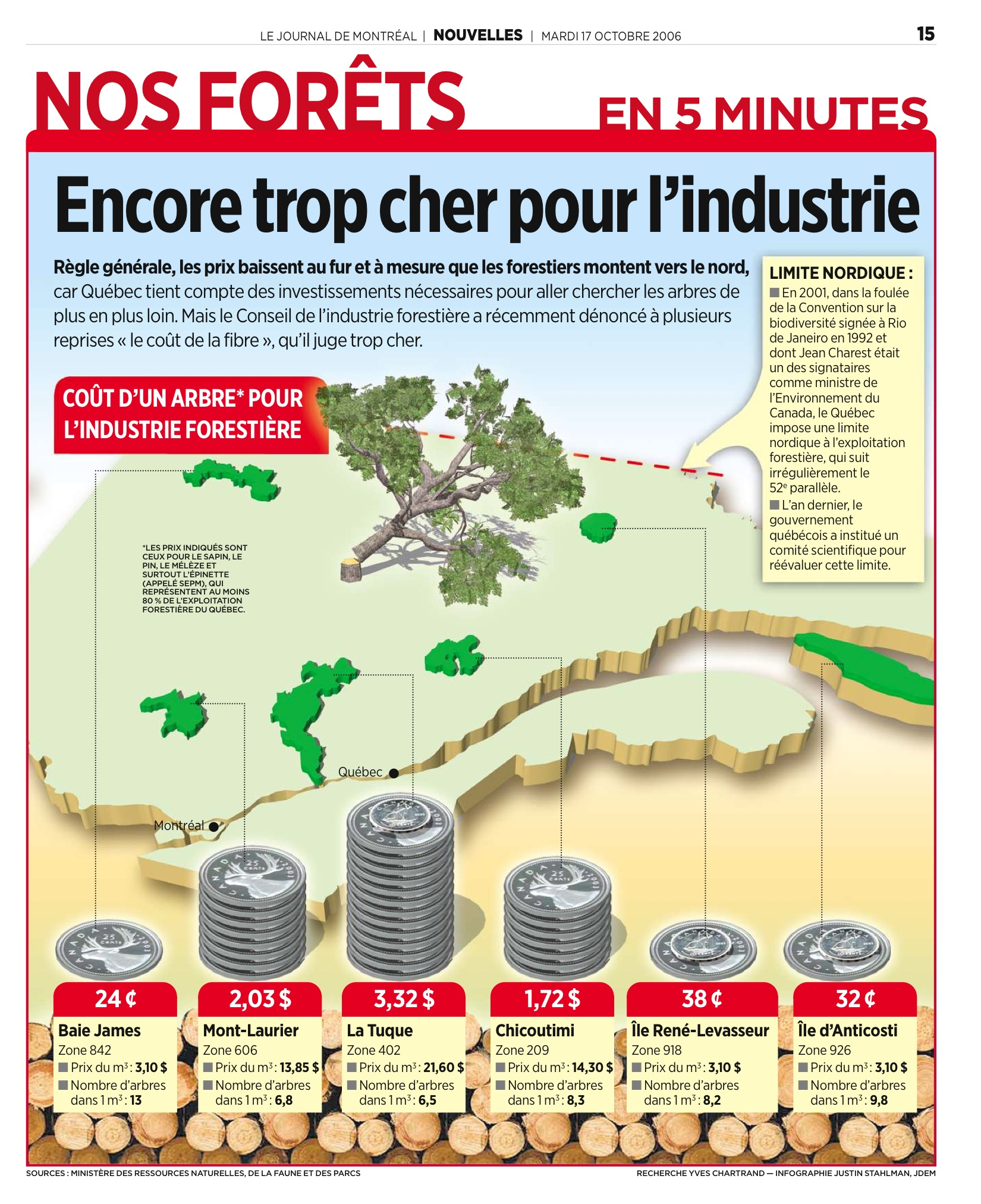 Infographie sur les prix du bois au Québec parue dans le Journal de Montréal le 17 octobre 2006.